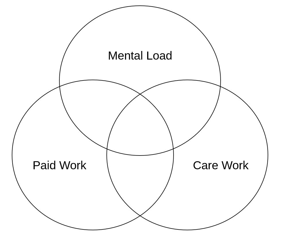 Mental Load: Mehrfachbelastung durch Erwerbs-, Pflege- und Koordinatsarbeit